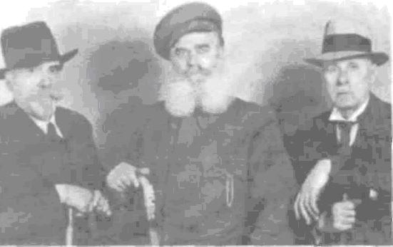 Dimo Yankov Tane Nikolov Dimitar Lyapov